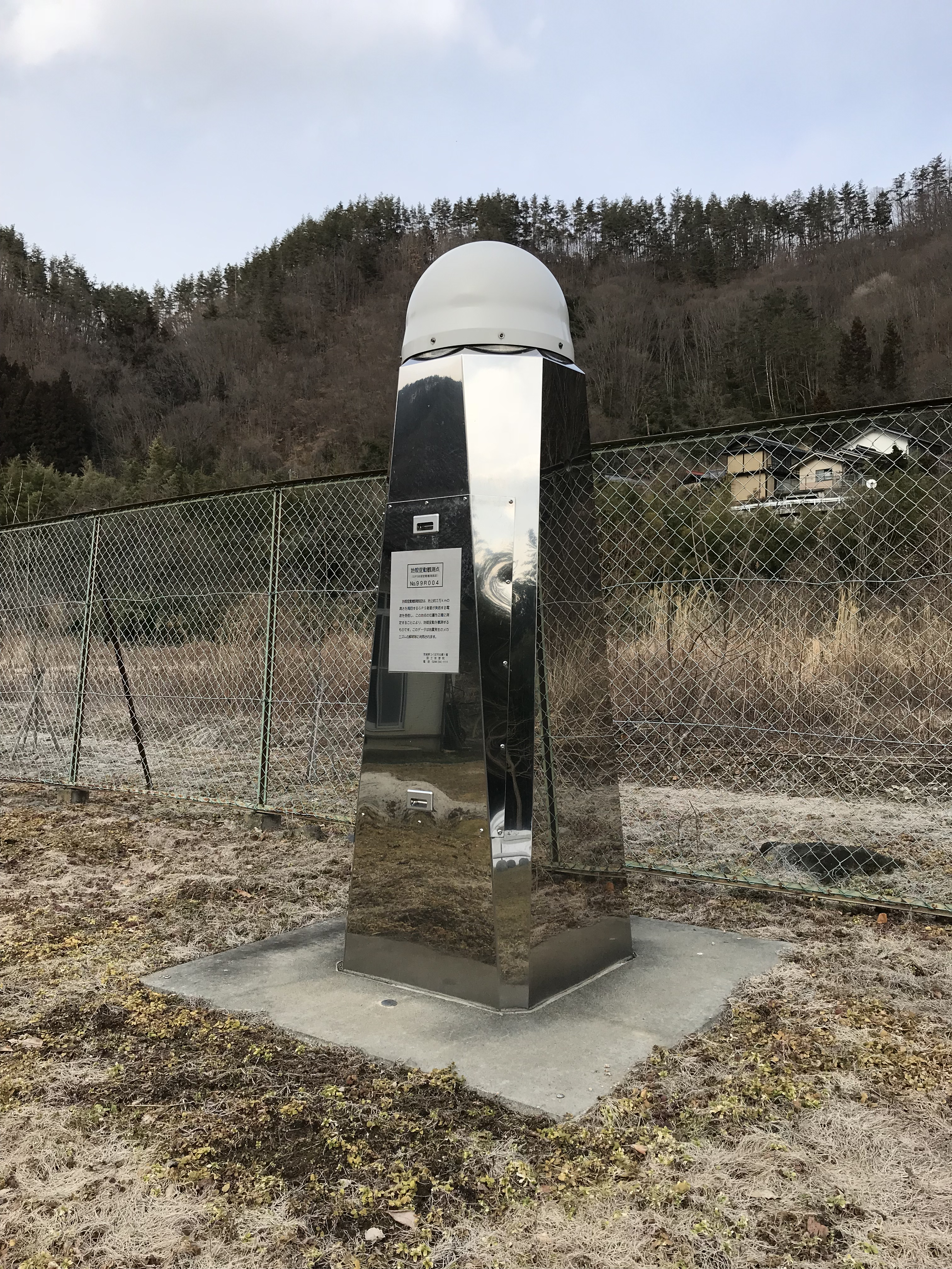 電子基準点 GPS地殻変動観測施設、生坂観測施設の外観。 No. 99R004